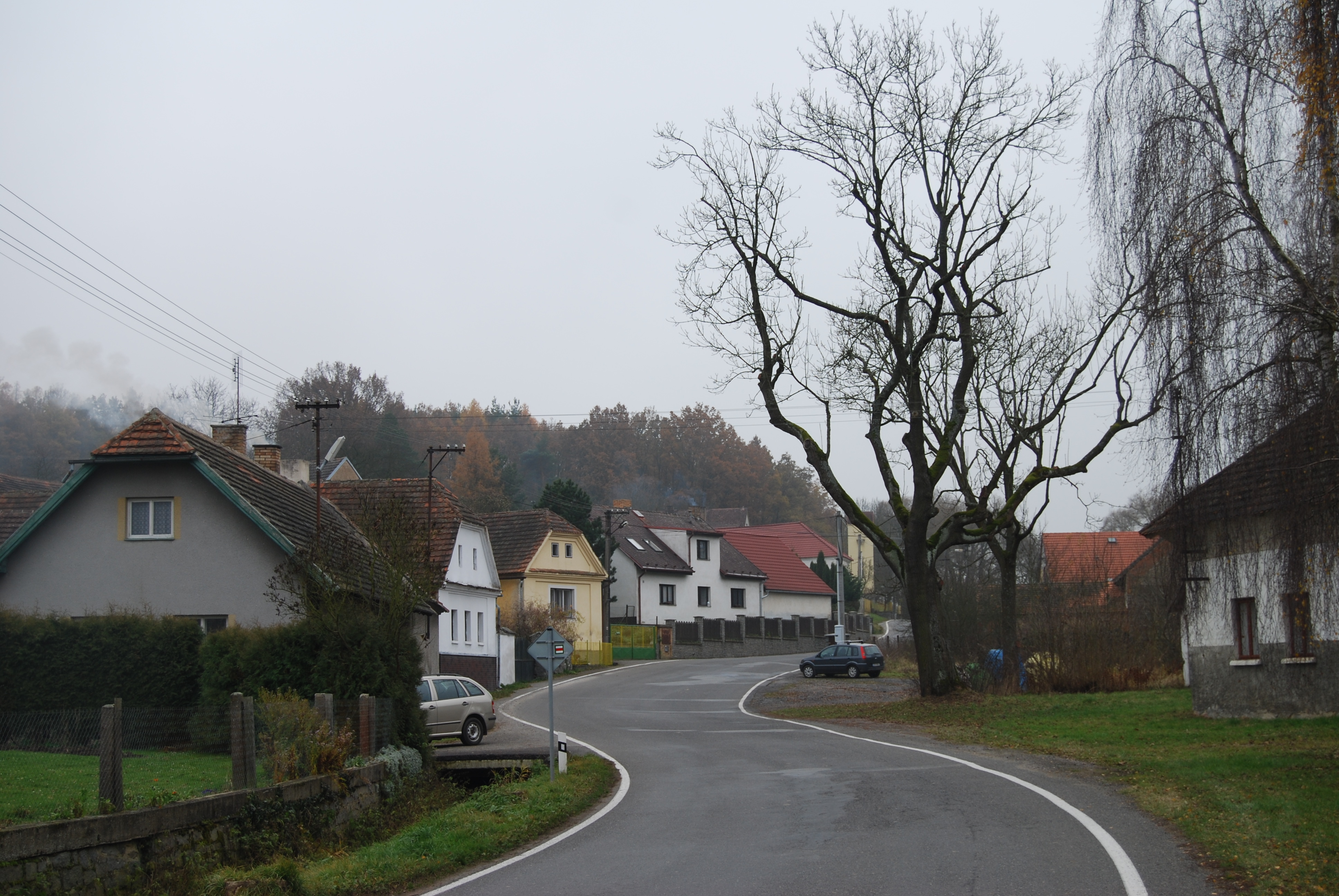 Pohled na část obce. Slavkovice je část obce Mišovice v okrese Písek. Česká republika.